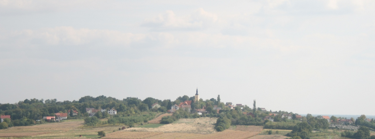 panorama Brckovljana slikano iz Stančića